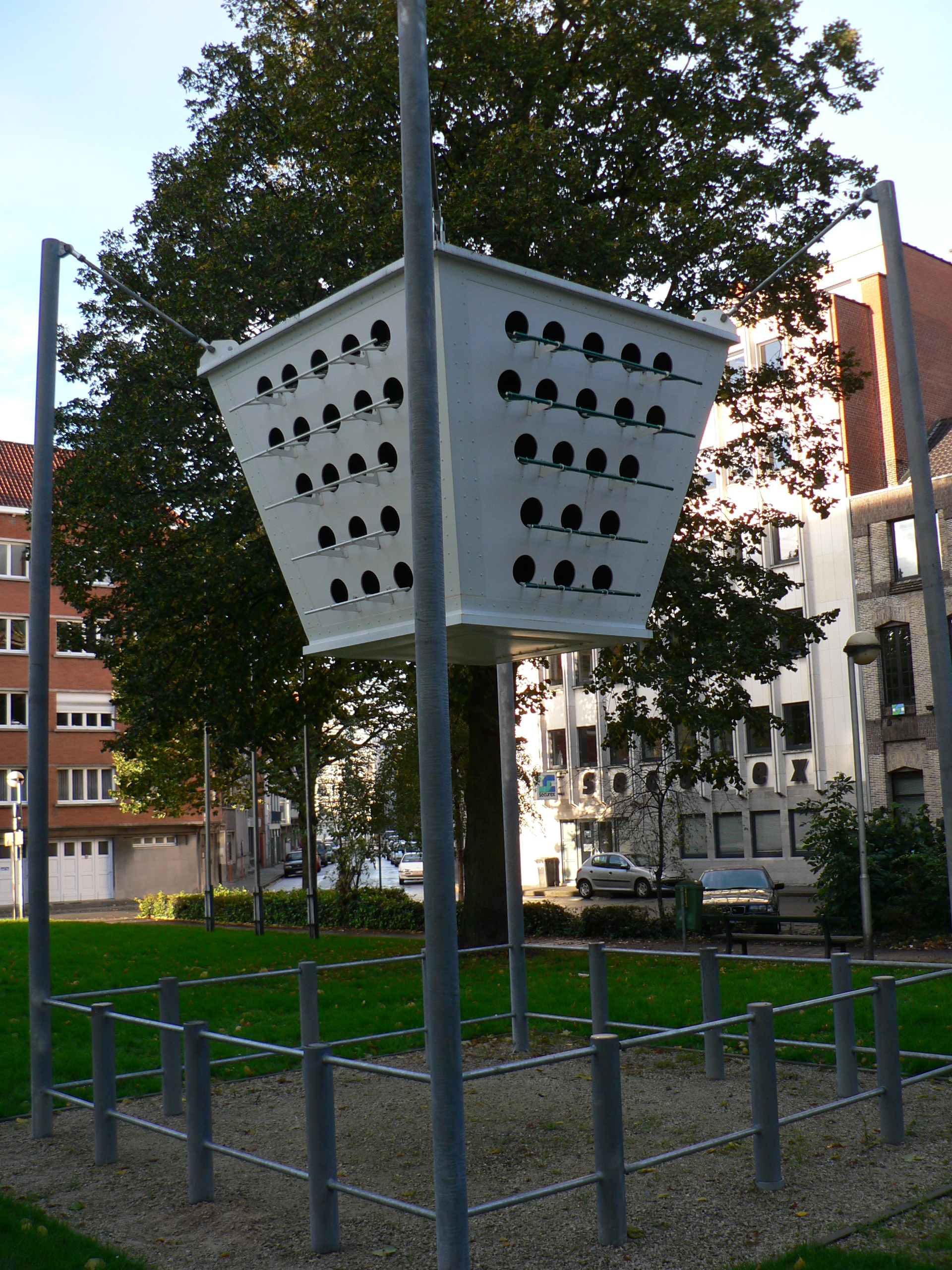 Duiventoren Kortrijk naast Conservatorium